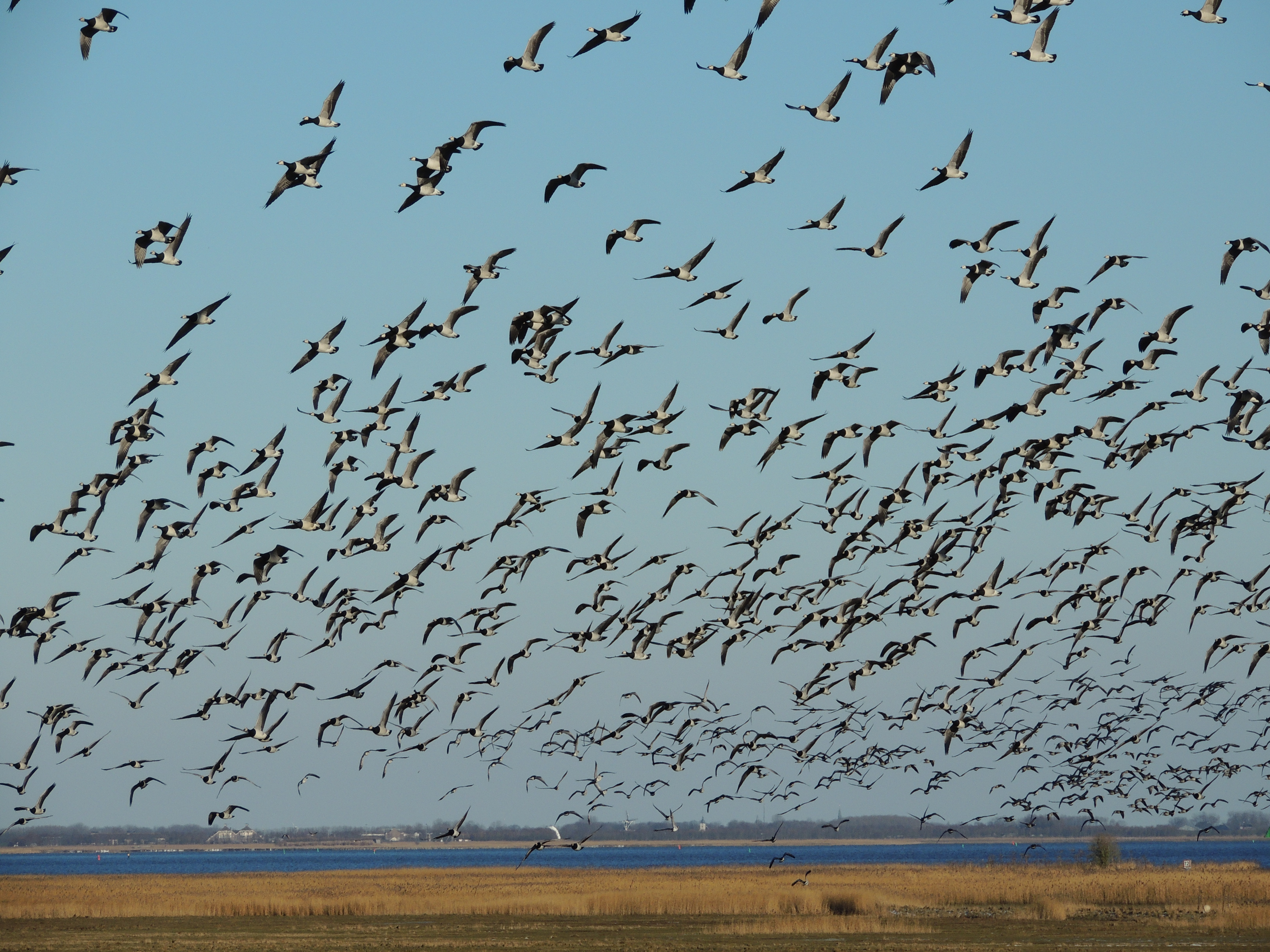 Brandganzen Ezumakeeg This is a photo or sound file made in Lauwersmeer National Park in the Netherlands, with the main subject of the file in the category: animals